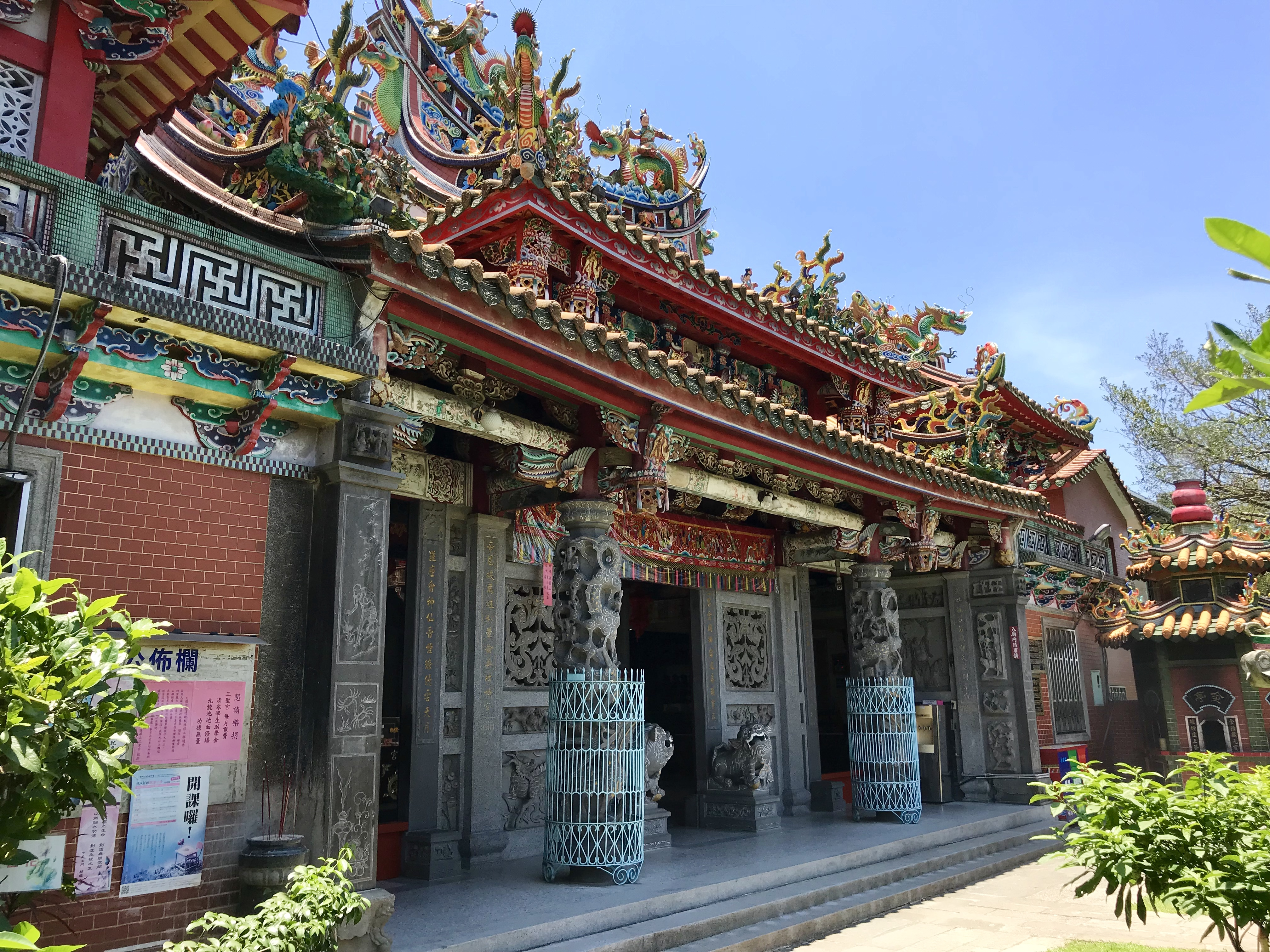 蓮華山三聖宮斜照